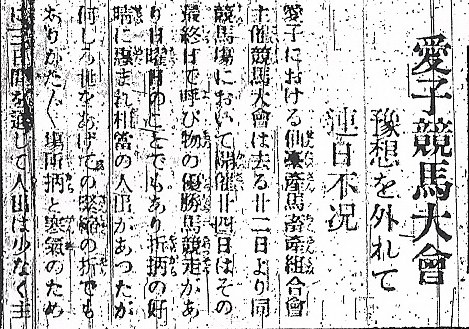 愛子競馬の開催状況を報道する記事